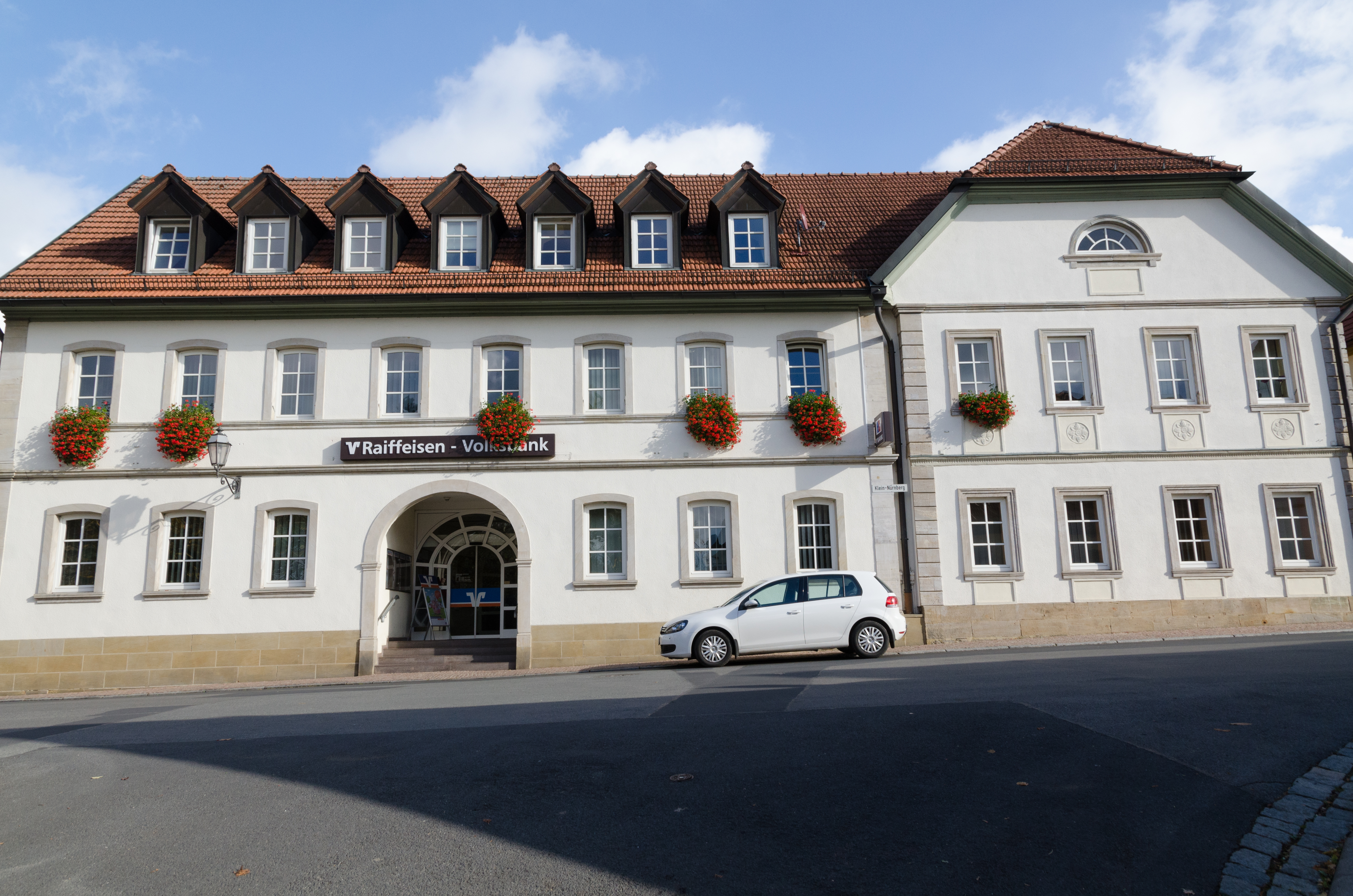 Ebern, Klein-Nürnberg 1-3